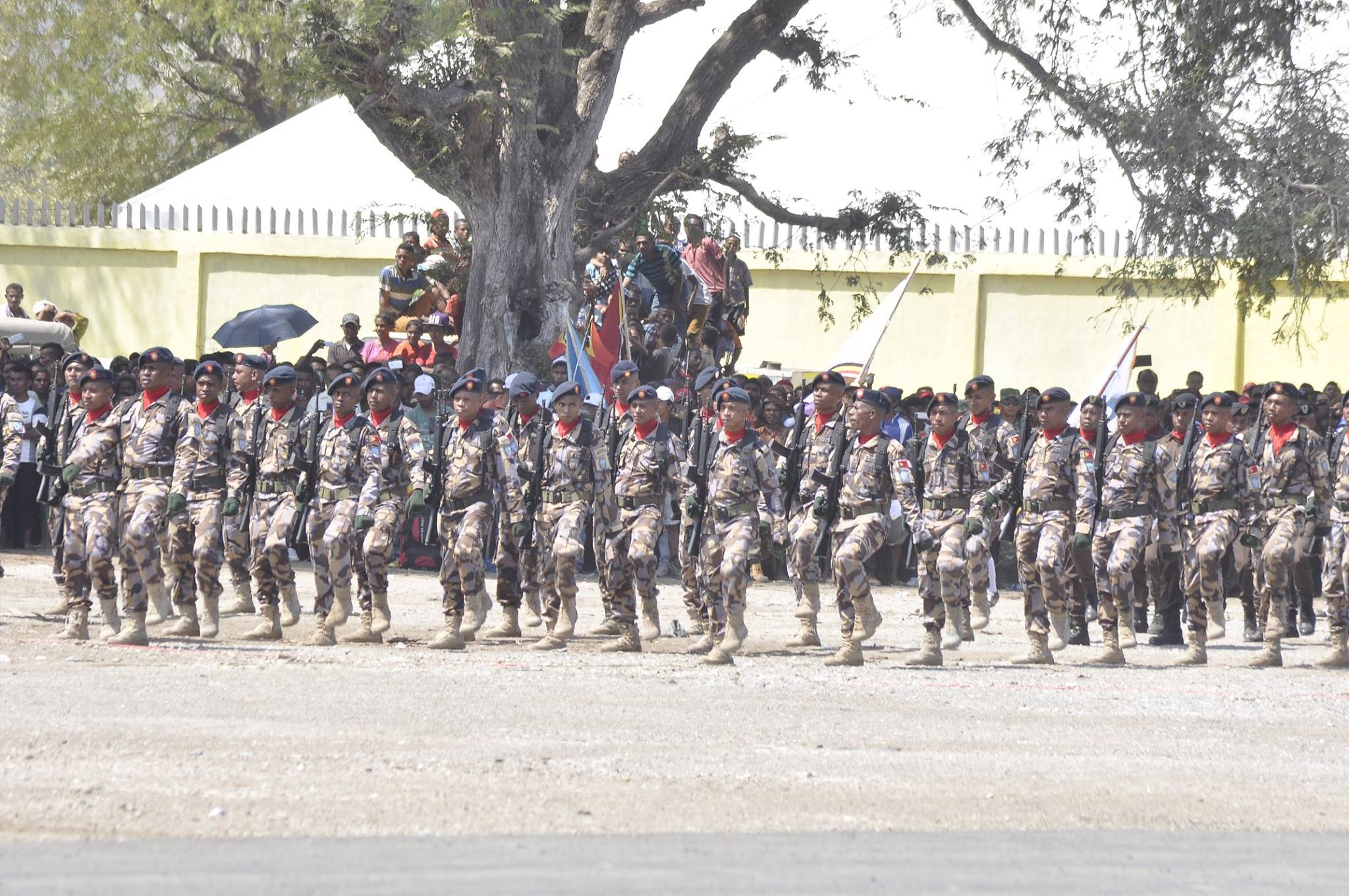 Tetun: Serimónia Komemorasaun Loron Proklamasaun Indpendénte